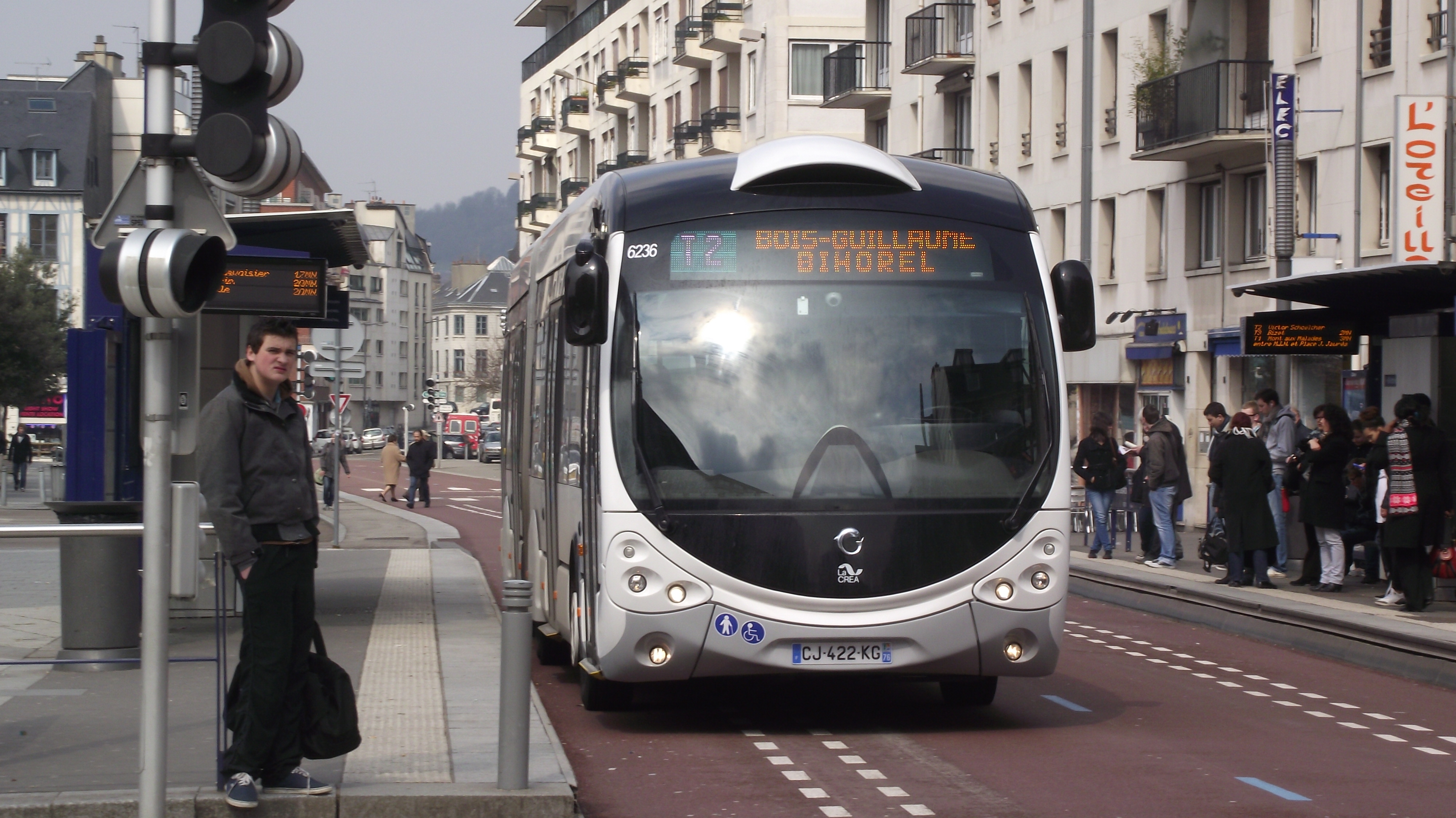 Geleide bussen op een busbaan